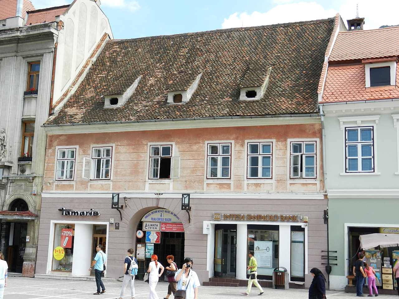 Casă Piata Sfatului 11